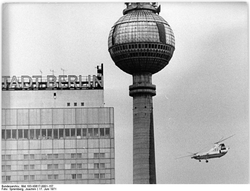 Berlin, Fernsehturm, Hubschrauber Mil Mi-12 ADN-ZB Spremberg 17.6.1971-ba Berlin: VIII. Parteitag der SED Die Berliner konnten heute (17.6.) die in relativ geringer Höhe fliegenden Neuheiten des sowjetischen Flugzeugbaus sehen: das Überschall-Passagierflugzeug TU-144 und den Lastenhubschrauber W-12 (Foto). Als Gruß an den Parteitag kreisten die beiden Maschinen vor ihrer Rückkehr nach Moskau um 14.15 Uhr über der Werner-Seelenbinder-Halle. [Berlin.- Sowjetischer Hubschrauber Mil Mi-12 im Flug neben Hotel "Stadt Berlin" und Fernsehturm]